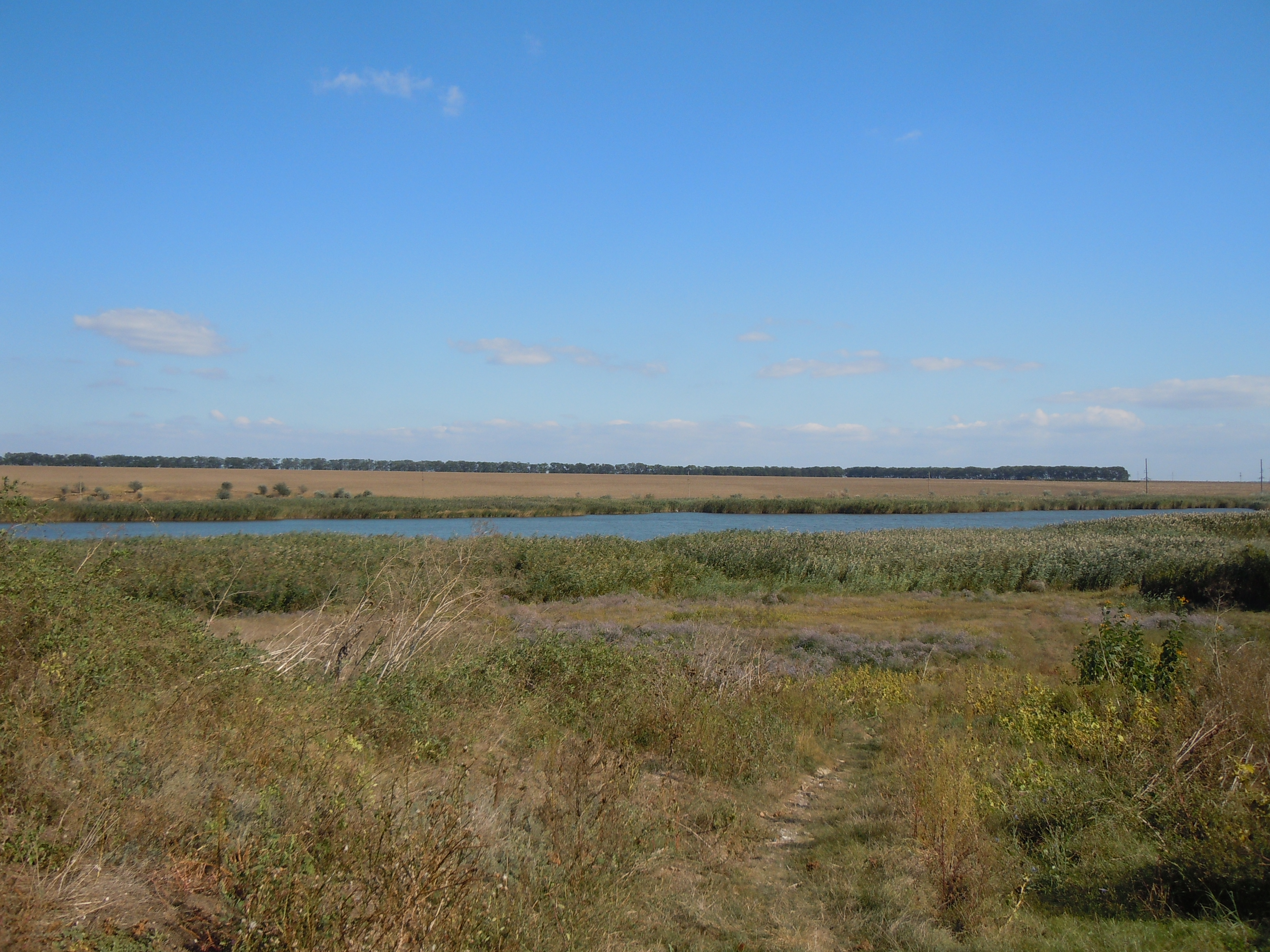 Вигляд на озеро Саф'яни з боку села Саф'яни (Ізміїльський район, Одеська область)